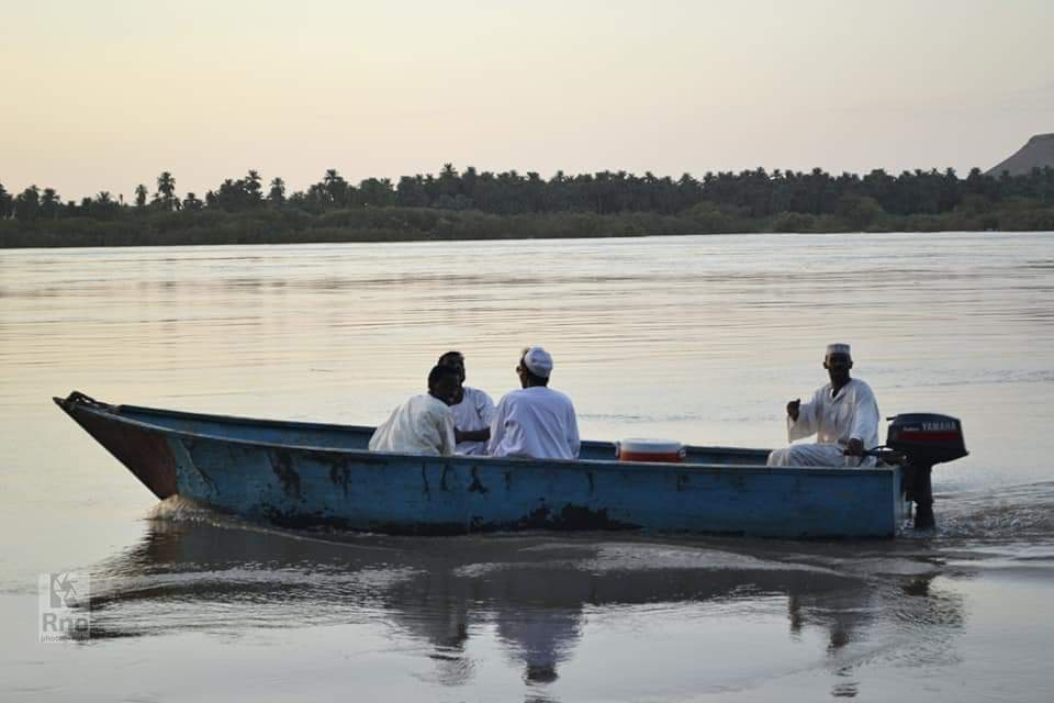 هذه الصورة في الولاية الشمالية في السودان من منطقة اسمها -سبو- وتعني أرض الحجر ، في الولاية الشمالية الانهار و البحار لذلك المواصلات عبارة عن مراكب ، هذه الصورة تحديداً تربط بين منطقة -سبو- و منطقة -كجبار- لذلك المواصلات عندهم عبارة عن هذا المركب الصغير . في الصورة يظهر عدد من الرجال يقطعون البحر للضفة الآخرى This is an image with the theme "Africa on the Move or Transport" from: Sudan